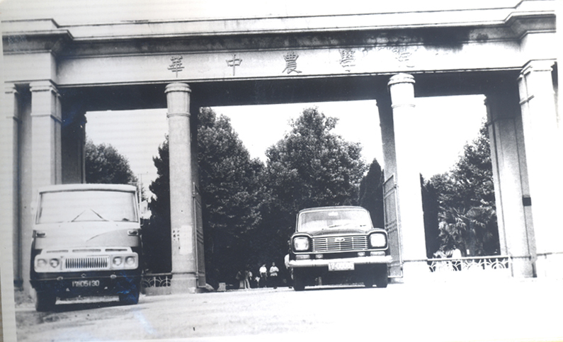 華中農業大學舊校門